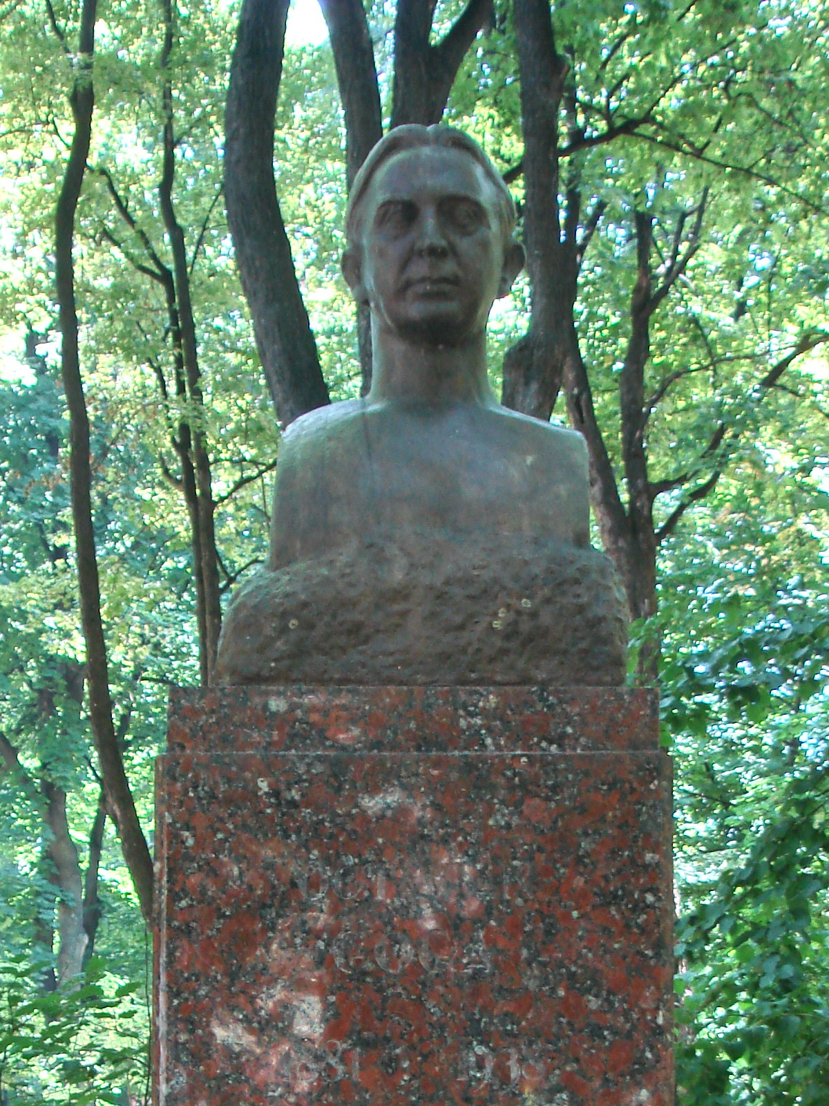 Бюст Октавиана Гоги в Аллее Классиков